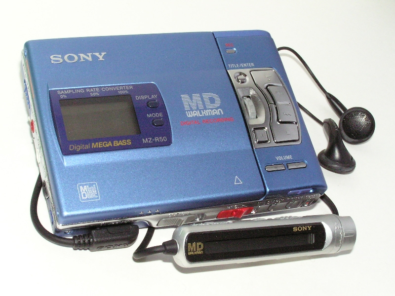 Sony Walkman MZ-R50